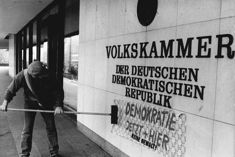 Berlin, Demonstration ADN-ZB Hirschberger-4.11.89 Berlin: Demonstration- Zehntausende Bürger beteiligten sich an einer Demonstration, zu der Berliner Kunst- und Kulturschaffende ins Zentrum der Hauptstadt eingeladen hatten. Wände des Hauses der Volkskammer wurden mit auf Tapeten geschriebenen Losungen beklebt.